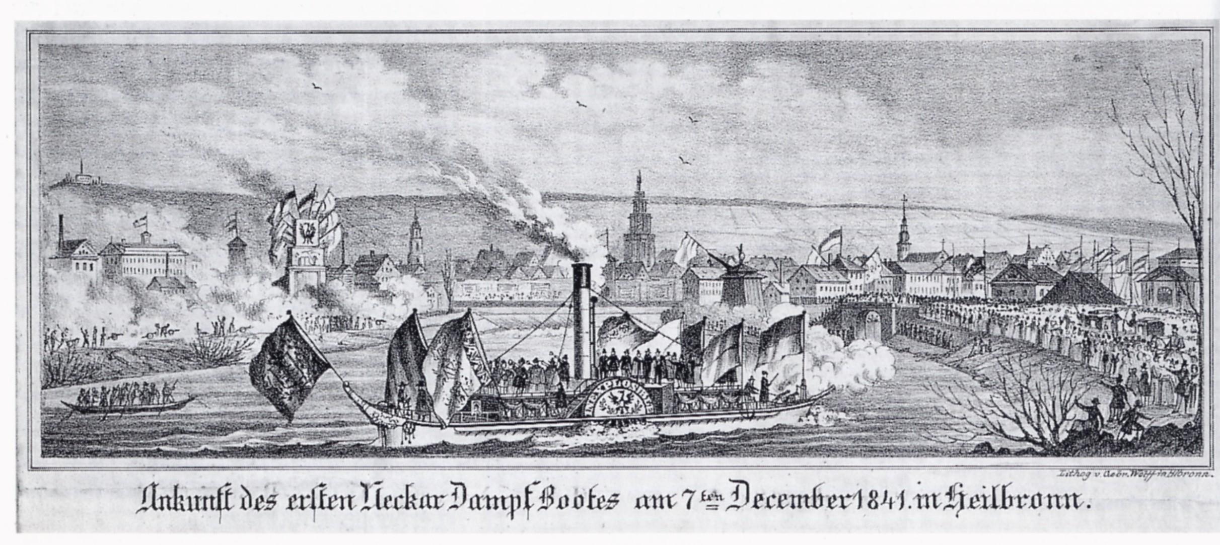 Neckardampfschifffahrt in Heilbronn 1841. Lithographie